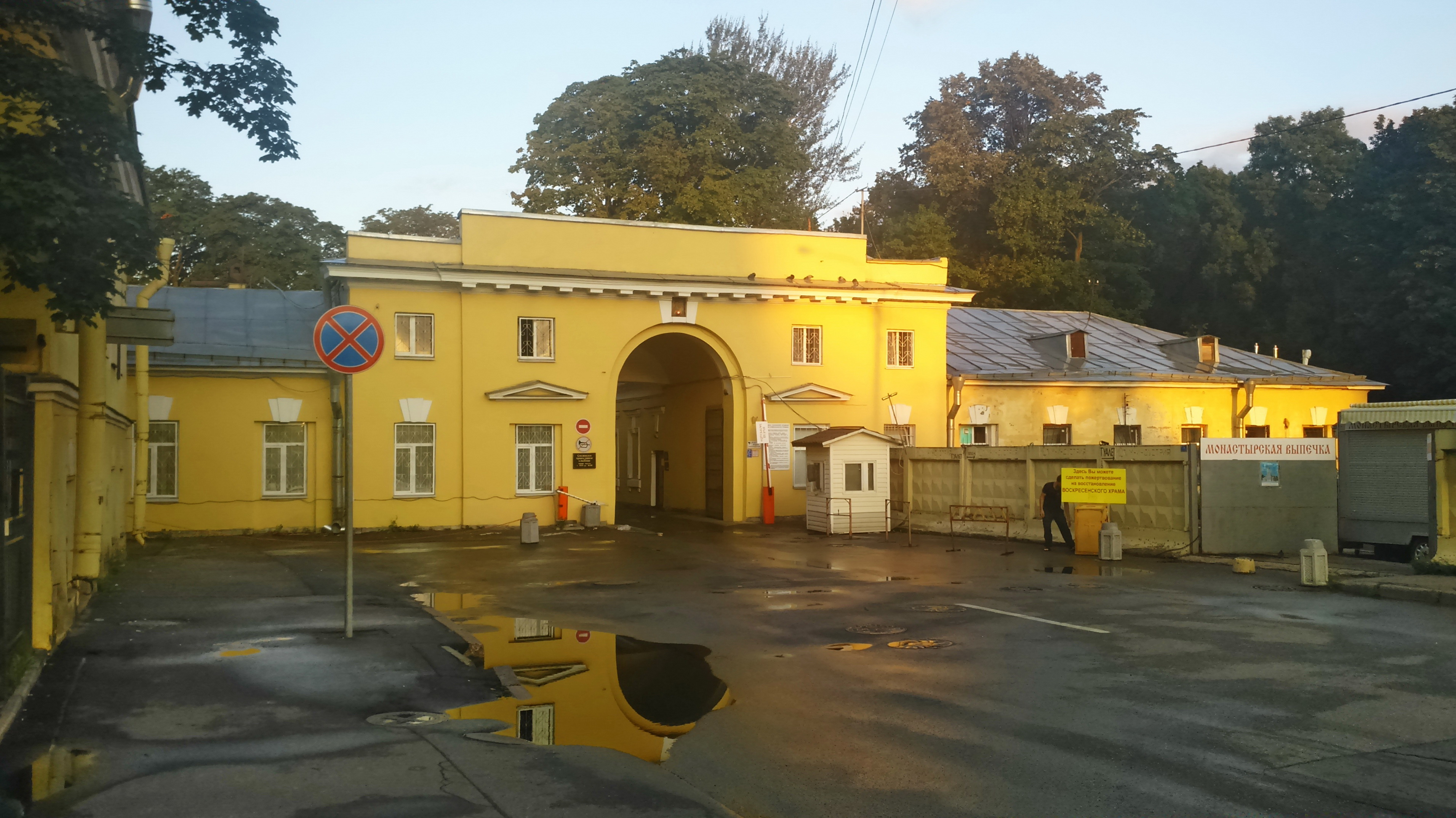 Главный вход на Смоленское православное кладбище в Санкт-Петербурге, Россия, с Камской улицы - комплекс построек архитектора Луиджи Руска, выполненный в 1807 - 1809 гг.